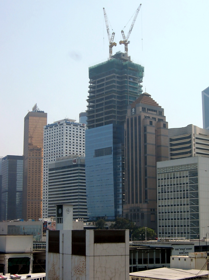 AIG Tower Site